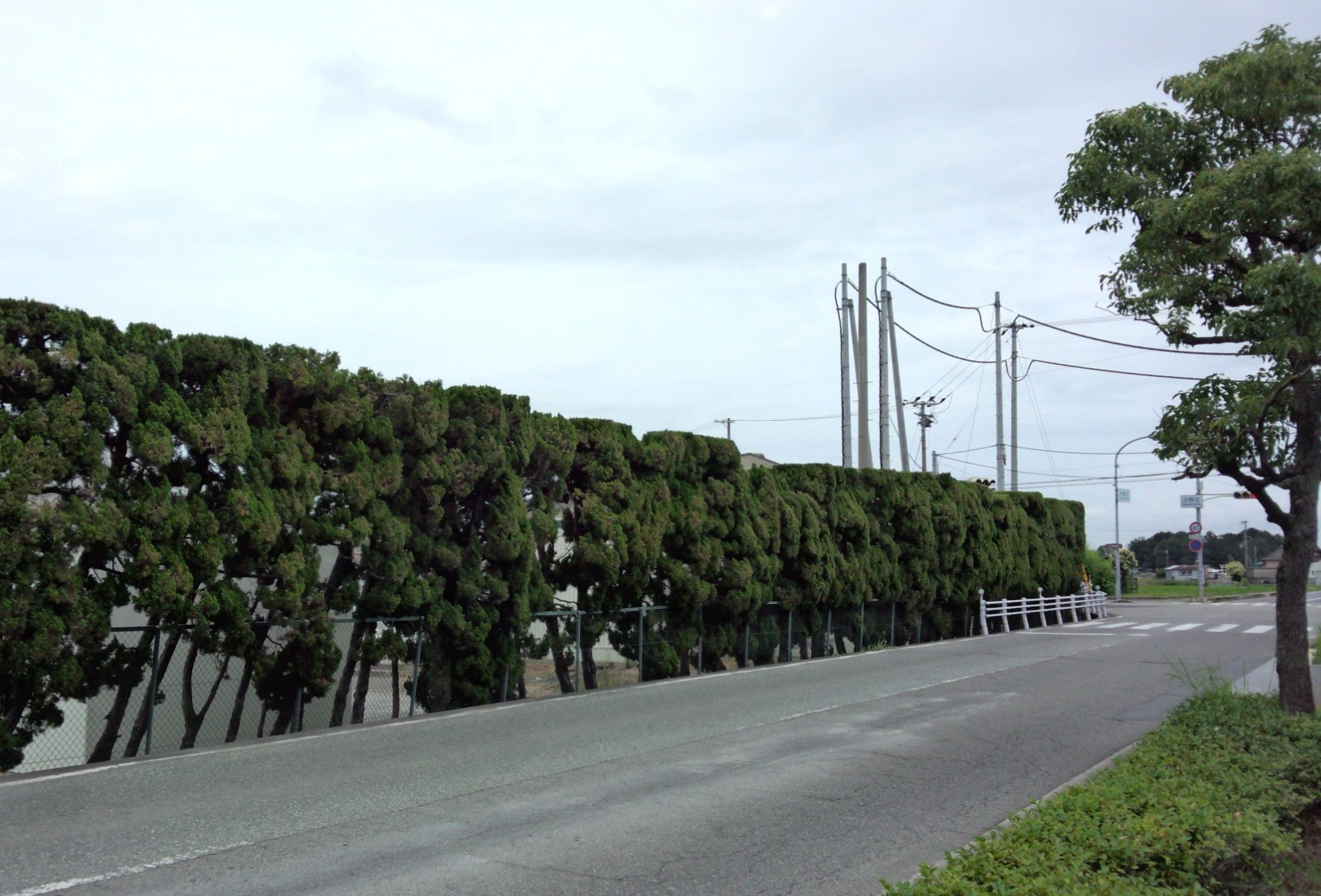 川崎車両前信号所跡